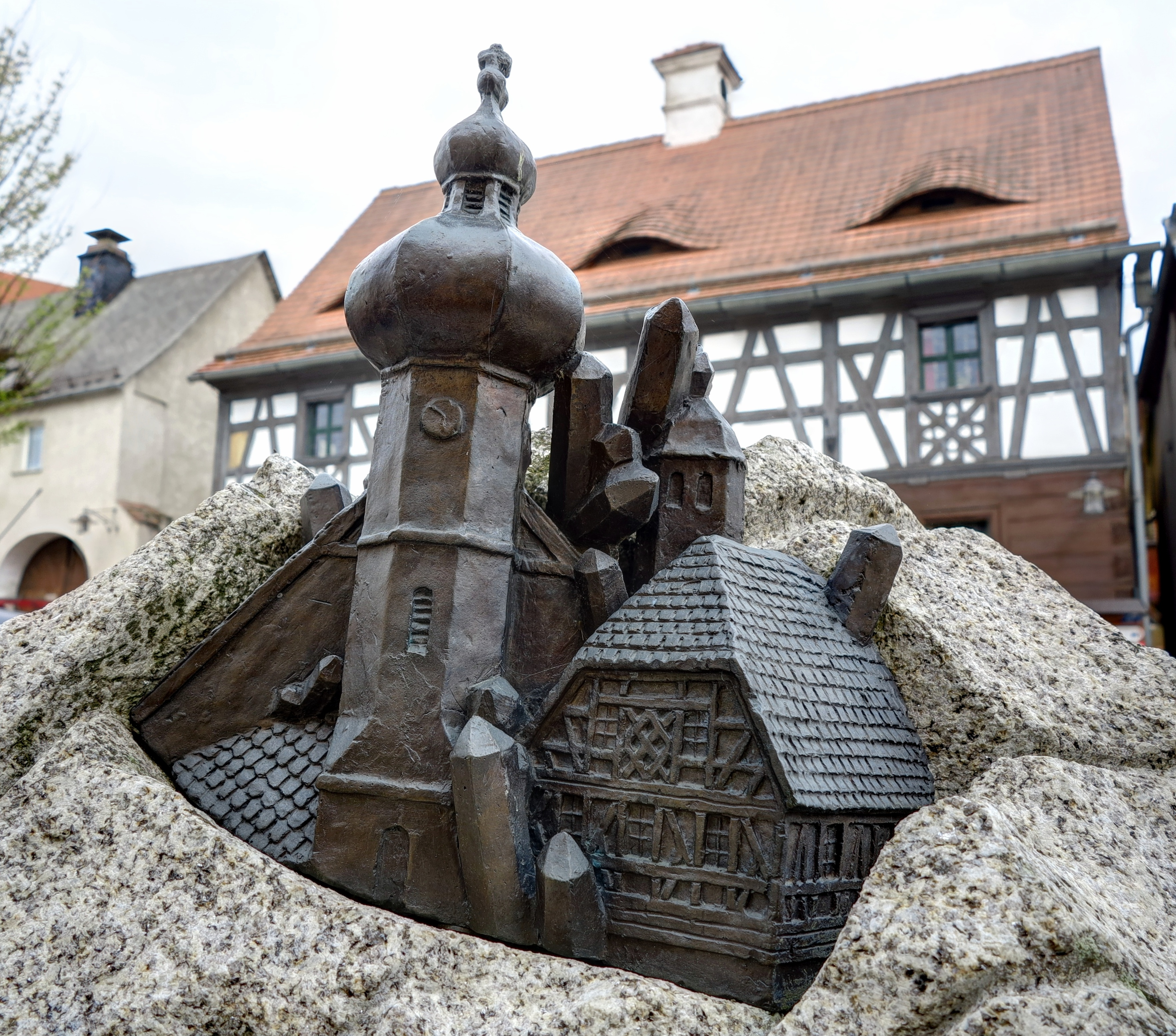 Deutschland, Bayern, Oberpfalz, Landkreis Tirschenreuth, Neualbenreuth, Detail aus dem Sagenbrunnen am Marktplatz